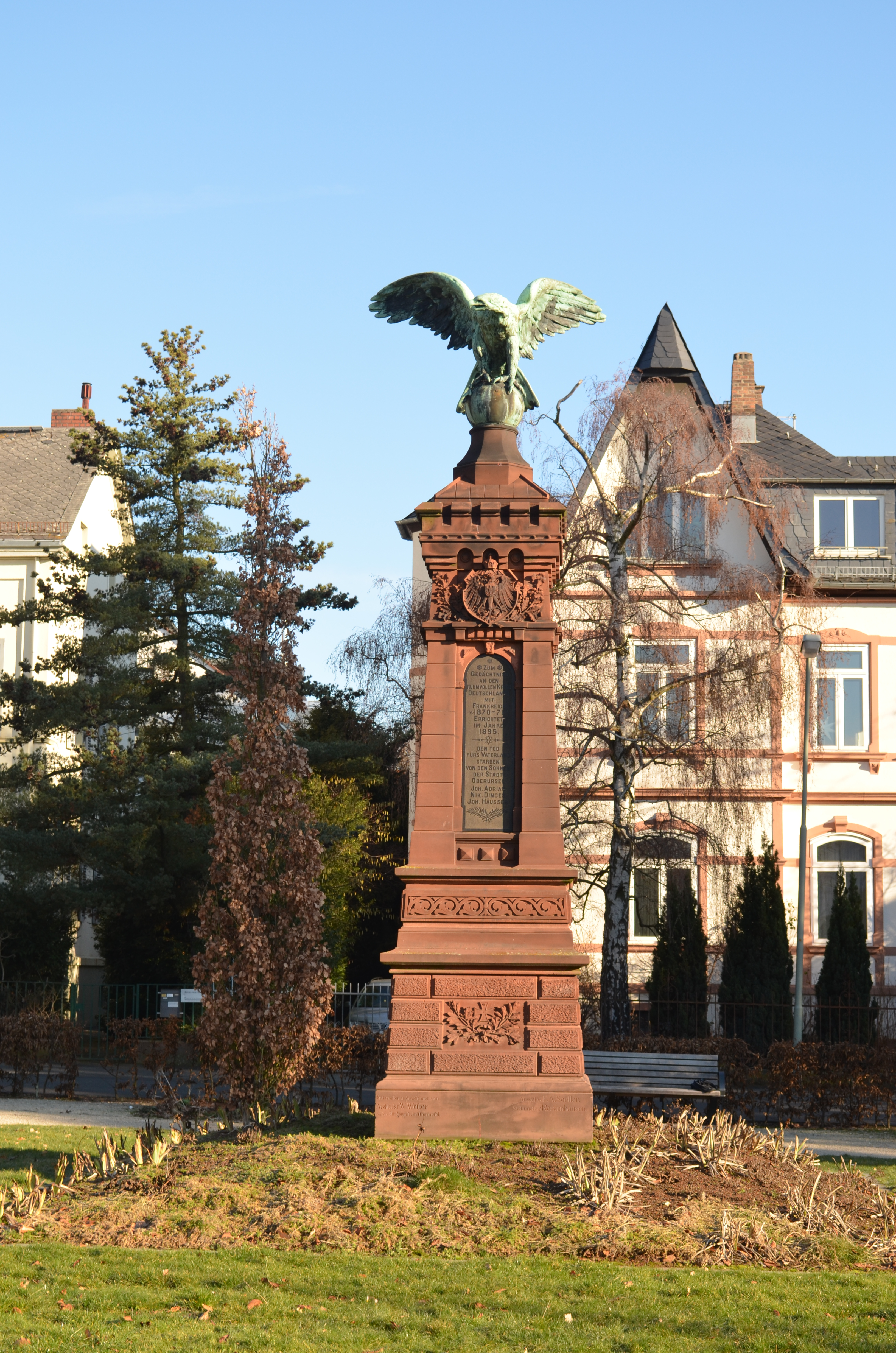 Oberursel, Adenauerallee, Kriegerdenkmal